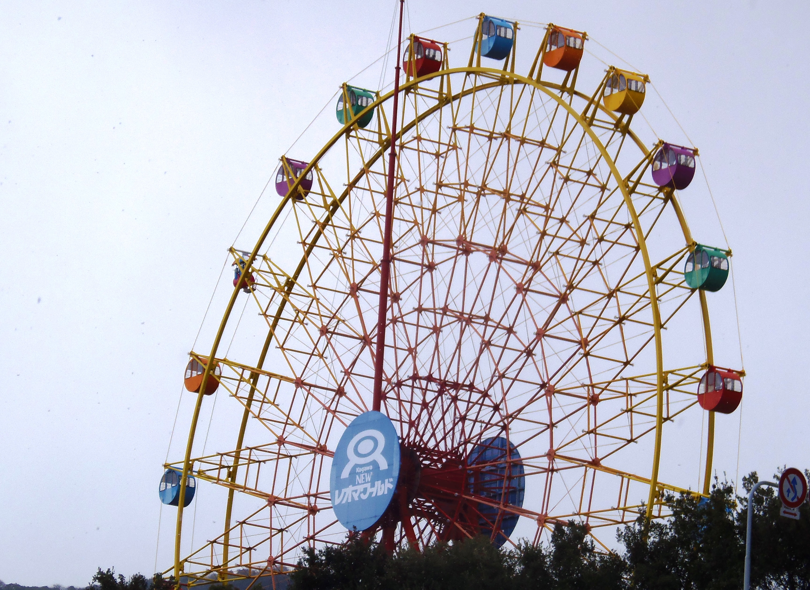 香川県丸亀市綾歌町にあるNEWレオマワールドの大観覧車